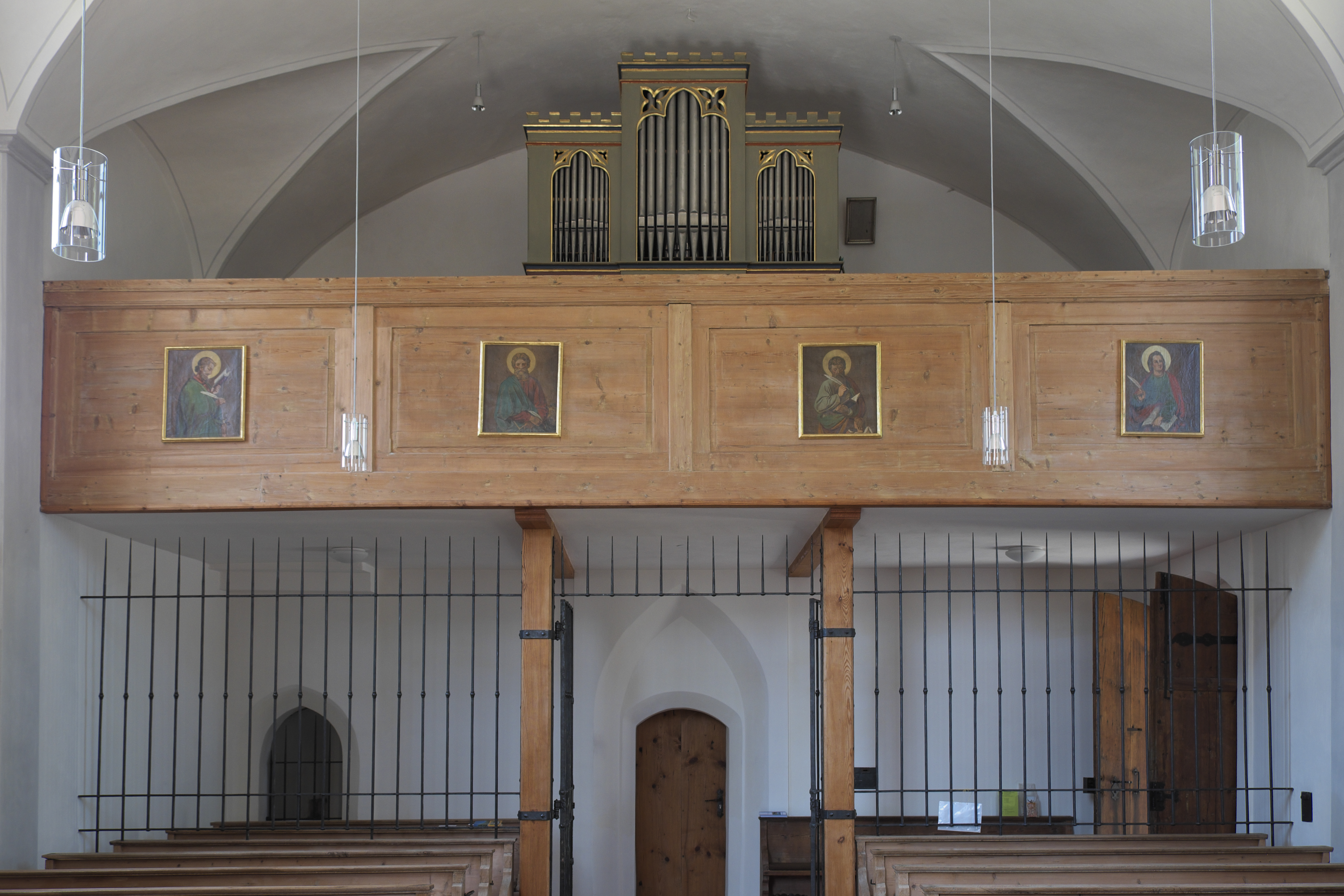 Katholische Nebenkirche Patrona Bavariae in Baierbrunn im Landkreis München (Bayern, Deutschland), Orgelempore